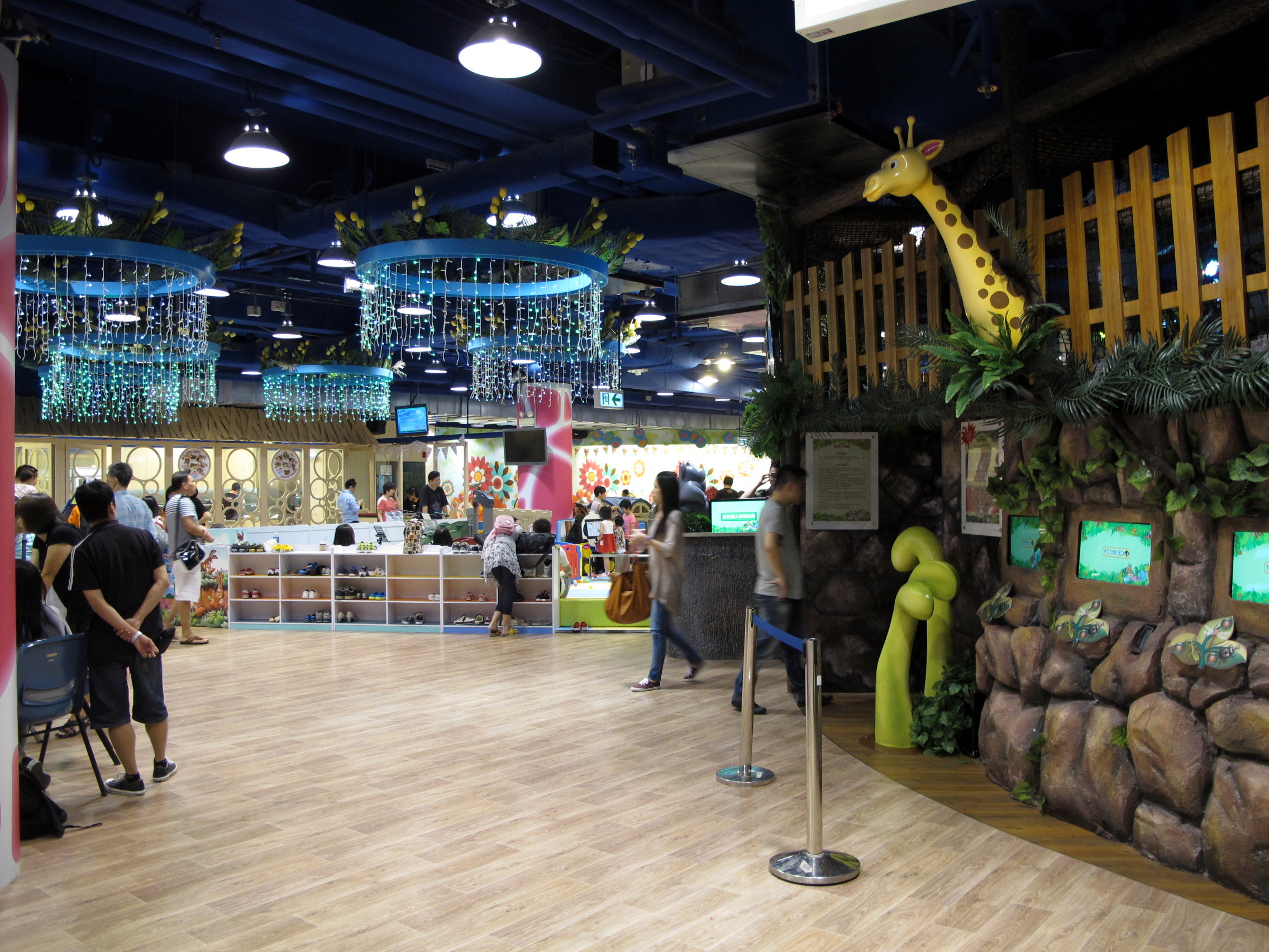 Domain Mall J-plus